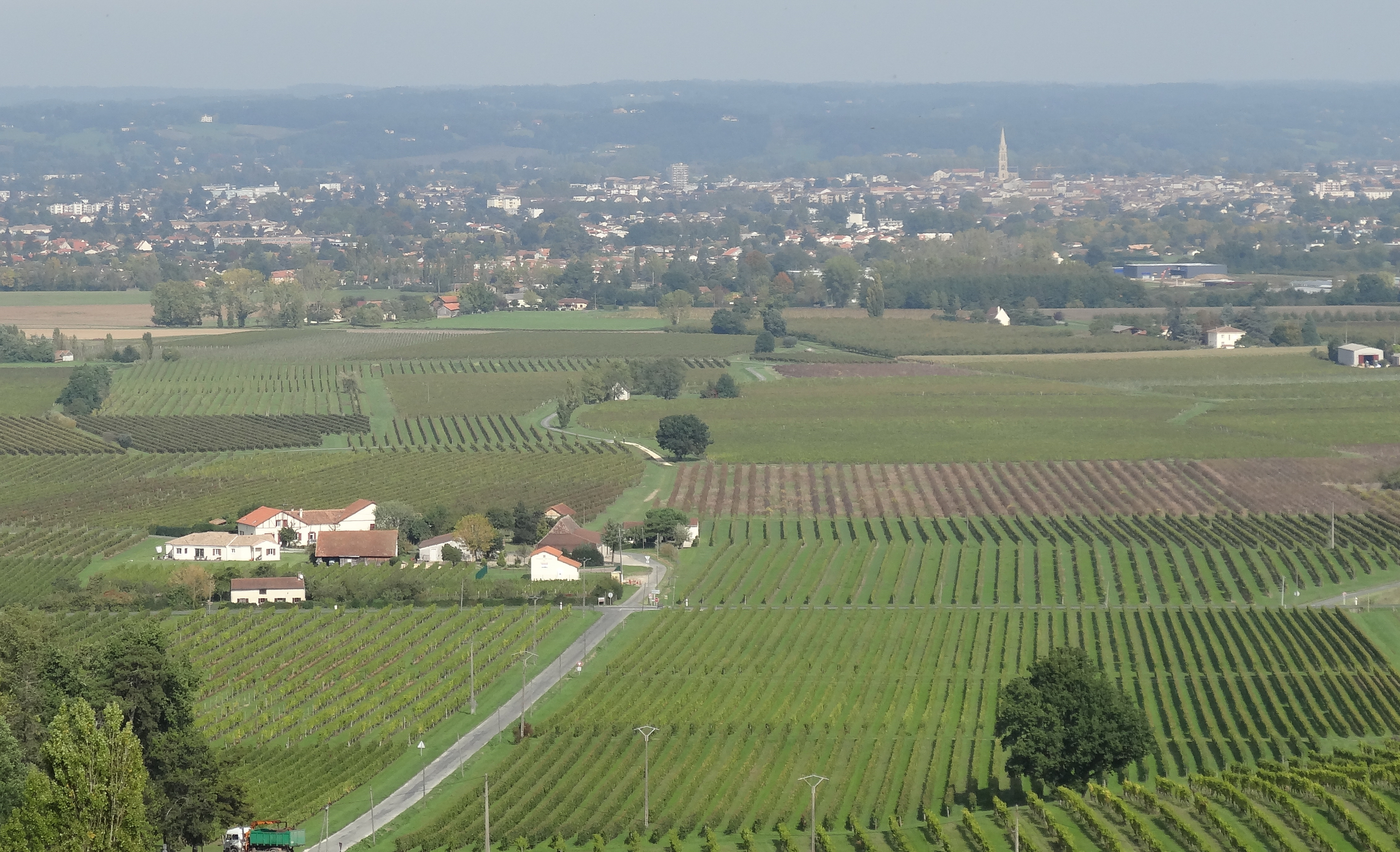 Vignoble de Bergerac autour de la ville de Bergerac (Dordogne)